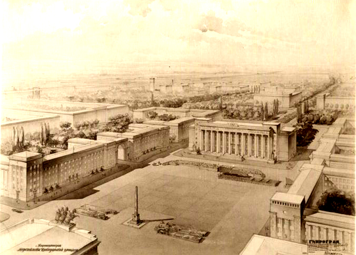 Проект Дома Советов в Луганске